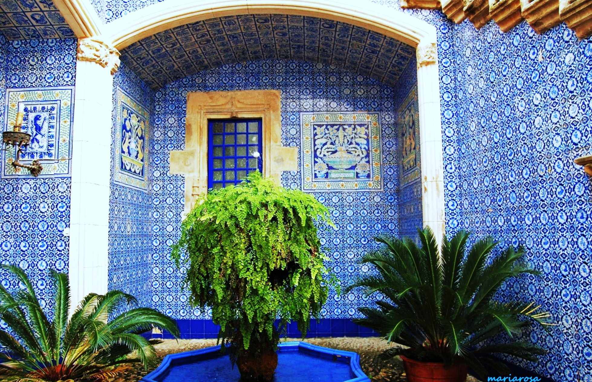 L'ou com balla (literalmente el huevo como baila) es una tradición cuyo origen peninsular se halla en la ciudad de Barcelona, Cataluña (España) que tiene lugar el día de Corpus. Se celebra desde 1588 y consiste en hacer bailar un huevo en los surtidores de las fuentes situadas en claustros, patios o jardines. El cascarón entero de un huevo vacío, se coloca en el surtidor de una fuente de modo que gira sin caerse. Las fuentes se decoran con flores y frutas. Los rincones en los que se puede ver esta tradición en Barcelona son: la catedral de Barcelona, el Pueblo Español, el Museo Frederic Marès (plaza Sant Iu), la parroquia de Santa Anna (Rivadeneyra, 3), la Casa de l'Ardiaca (Santa Llúcia, 1), el Ateneu Barcelonés (Canuda, 6), la parroquia de la Puríssima Concepció (Aragó, 299) y la Reial Acadèmia de Bones Lletres (Bisbe Caçador, 3). En el 2009 adicionalmente se puede ver en: Arxiu de la Corona d'Aragó (Palau del LLoctinent) y en el colegio ESCOLAPIES Llúria. Otras localidades de larga trayectoria en esta tradición son Sitges en el Palau Maricel, y Tarragona en la fuente del claustro de la Catedral.